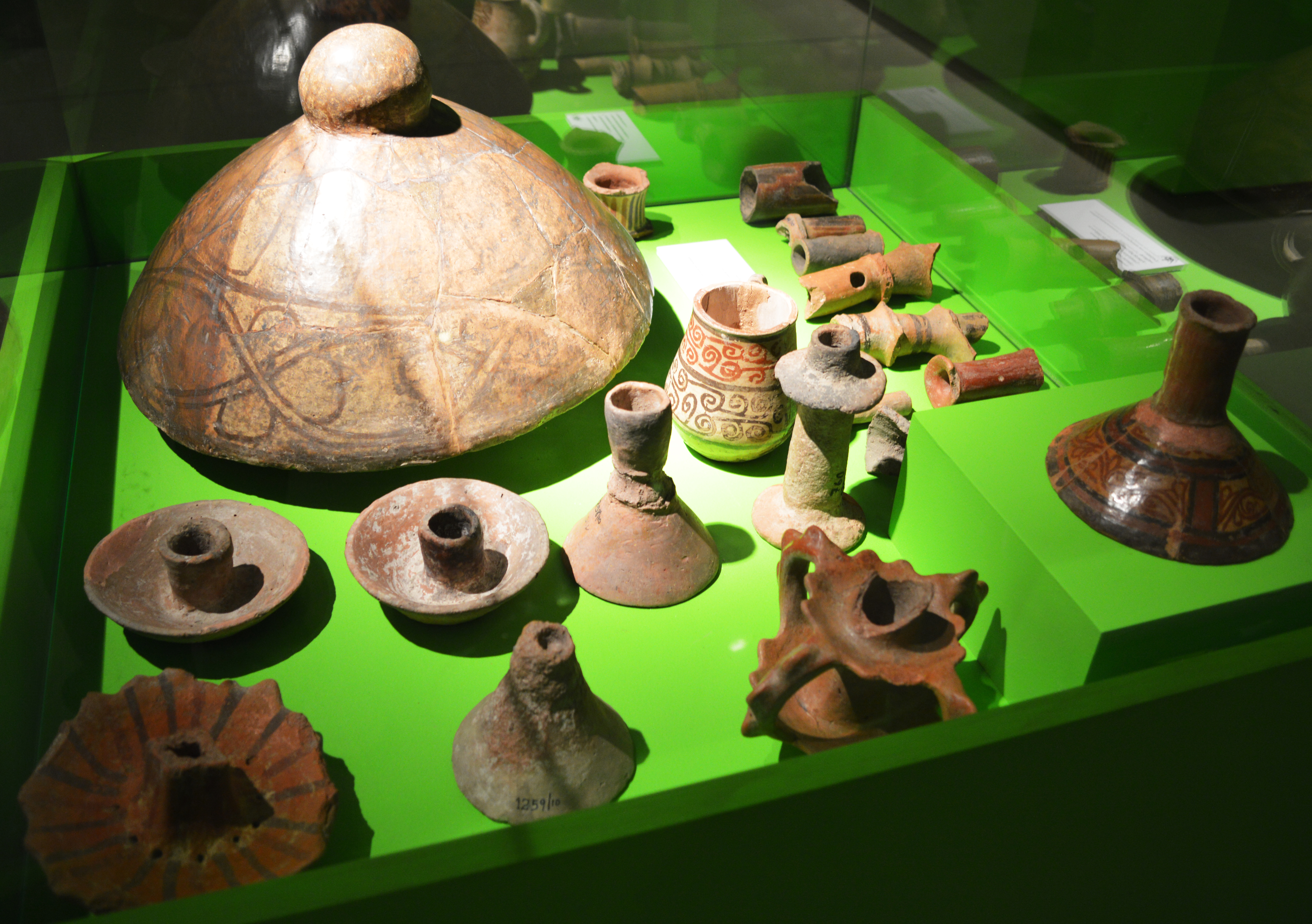 Alfarería indígena.